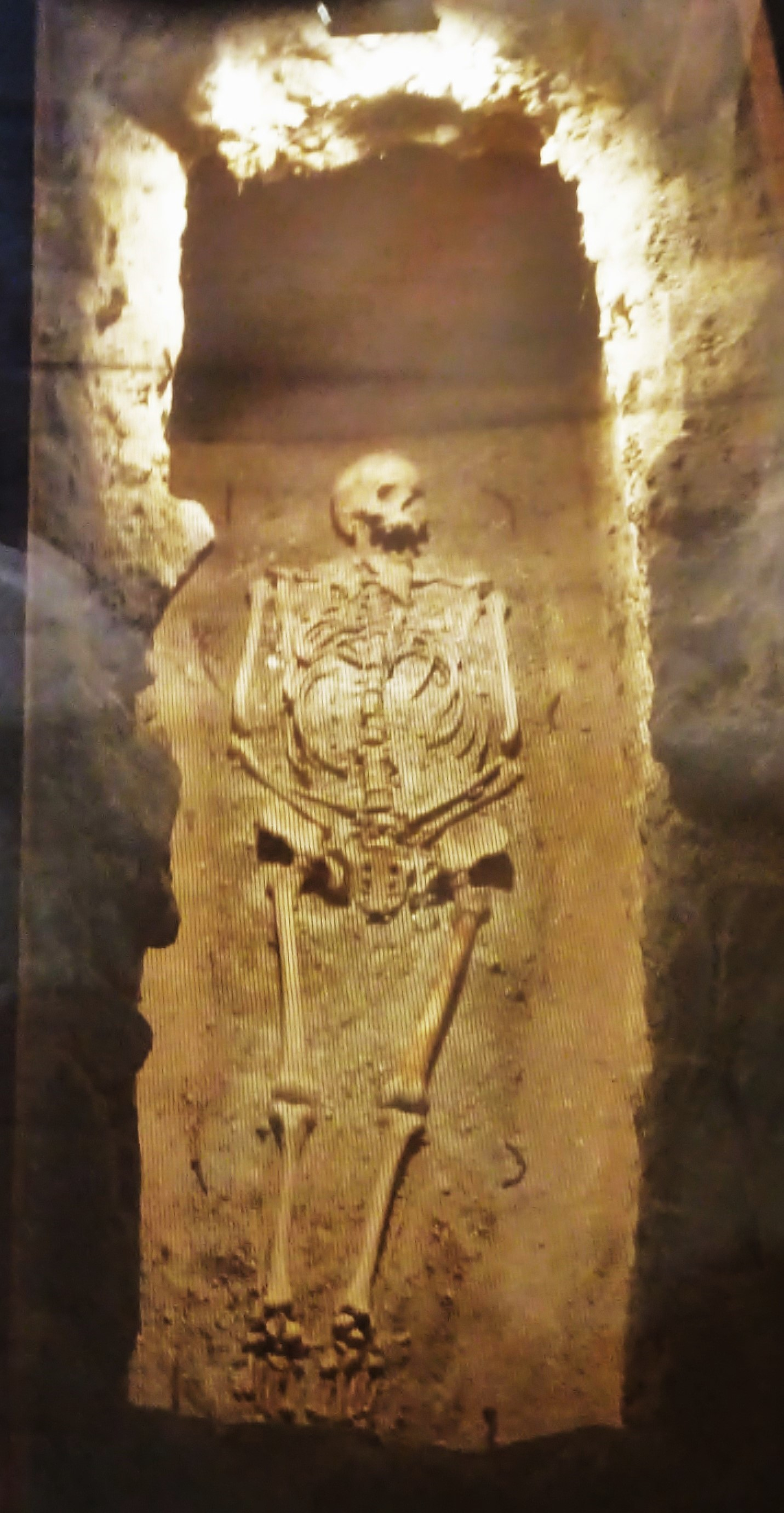 Stift Rein, Grabstätte von Markgraf Leopold I., "Der Starke", gestorben am 26. Oktober 1129, Stifter von Rein